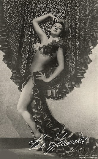 La Jana